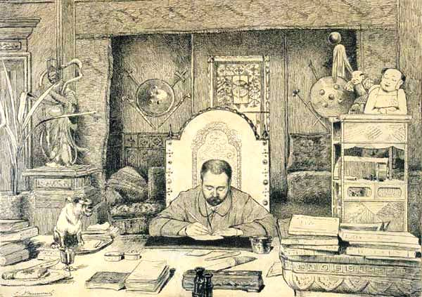 Emile Zola à sa table de travail de Médan.